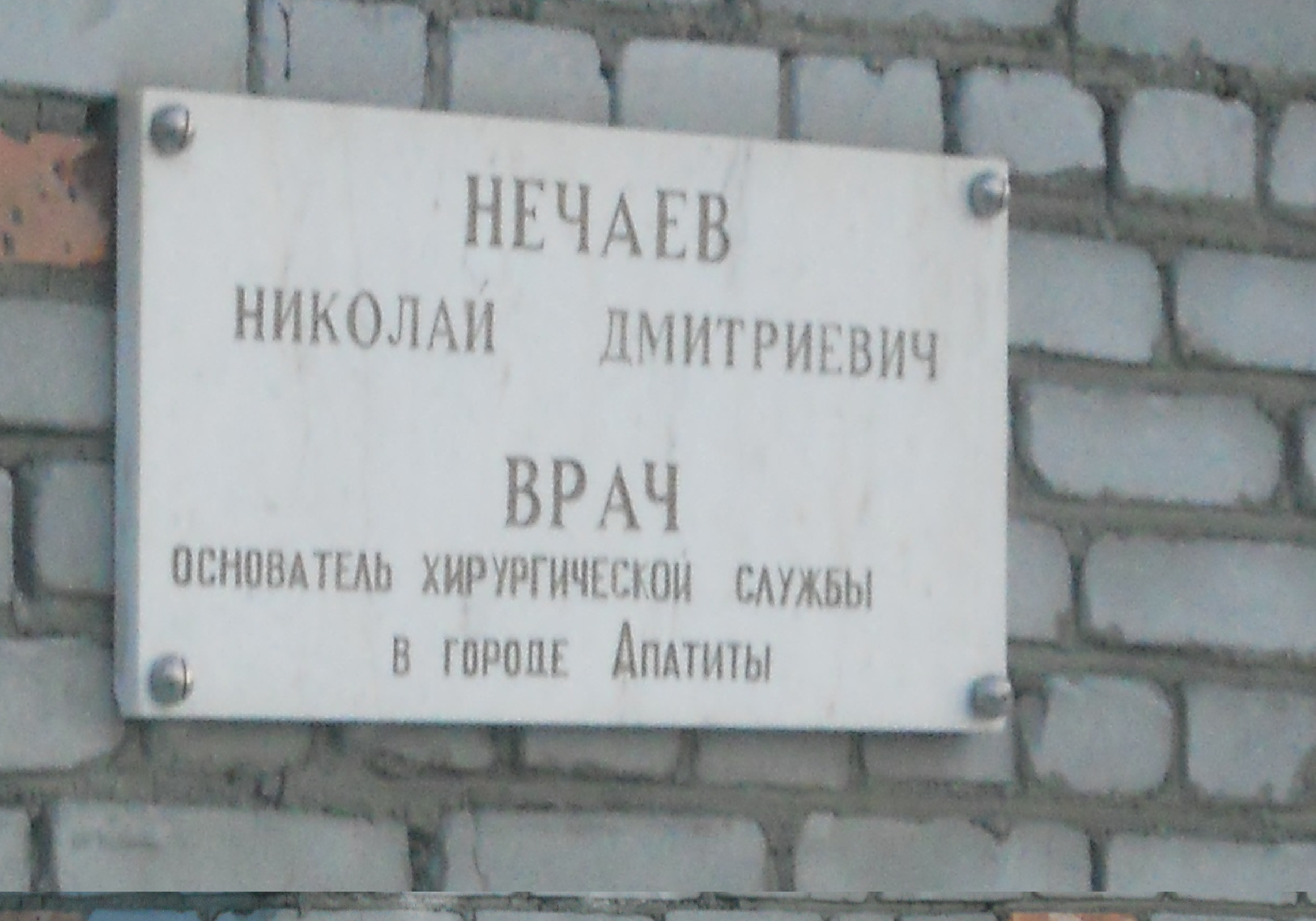 Мемориальная доскаНечаеву